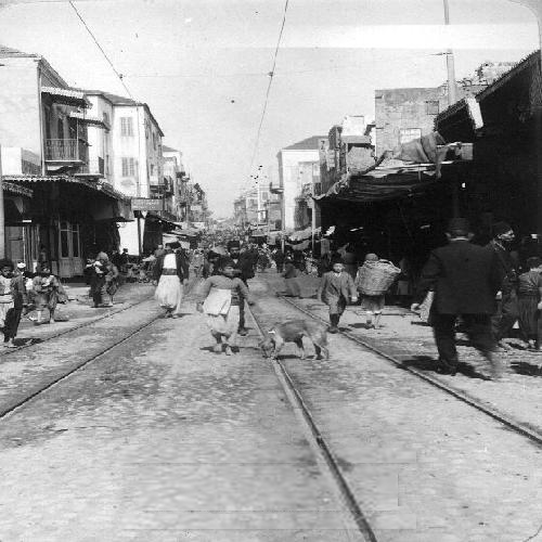 בירות (בתוך אלבום של ריכרד ליכטהיים מסע לארץ ישראל 1910)